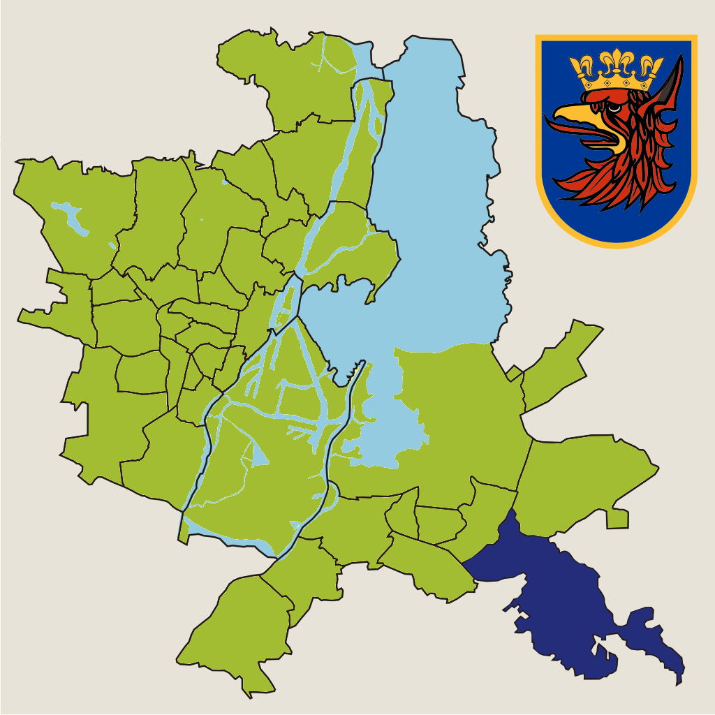 Osiedle "Płonia-Śmierdnica-Jezierzyce" w Szczecinie – jednostka pomocnicza miasta w 2010